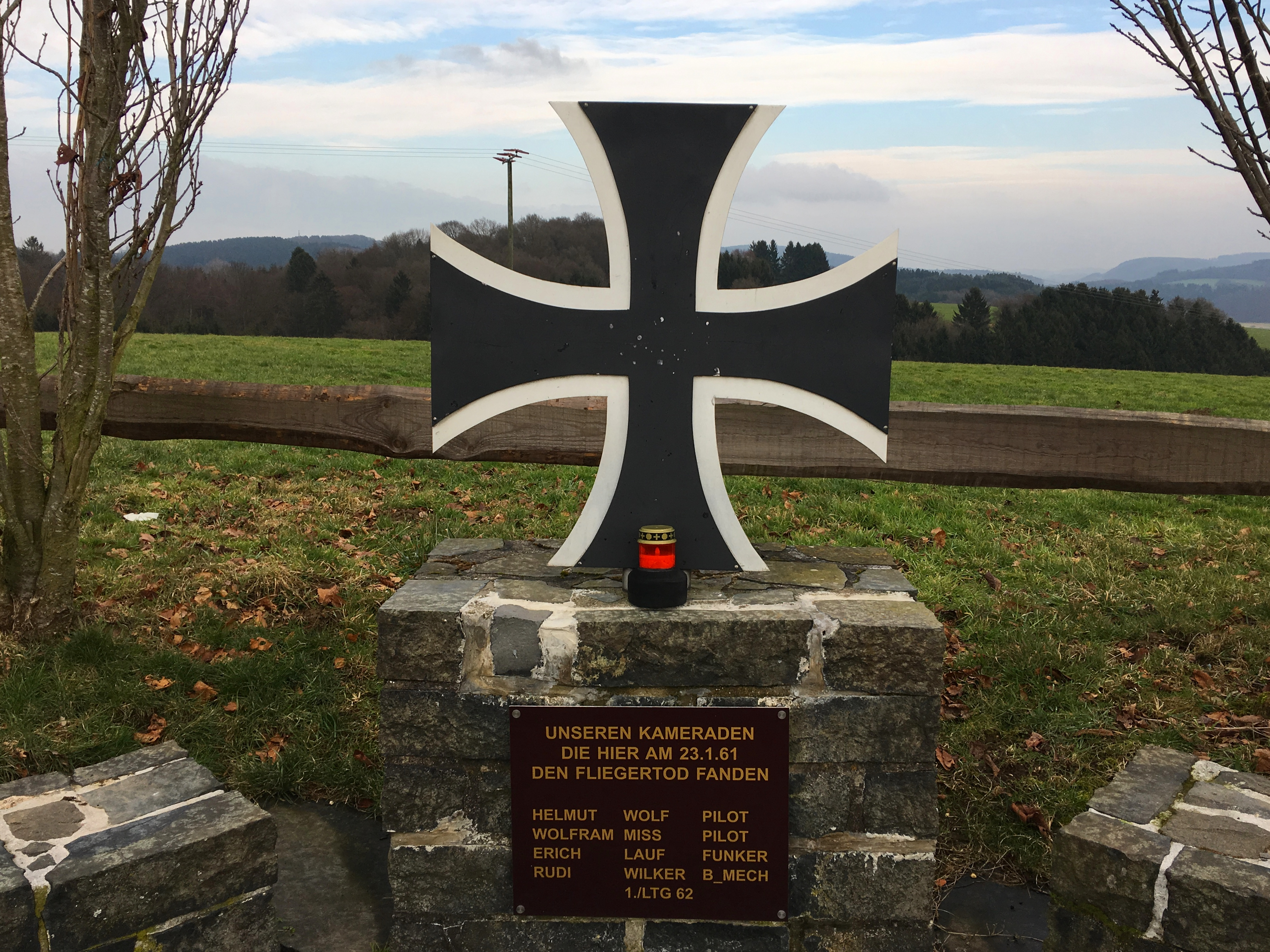 Denkmal zum Gedenken an die Soldaten, die während des Absturzes einer Bundeswehrmaschine Typ Noratlas 2501 im Jahr 1961 in Overath-Vilkerath den Tod gefunden haben.